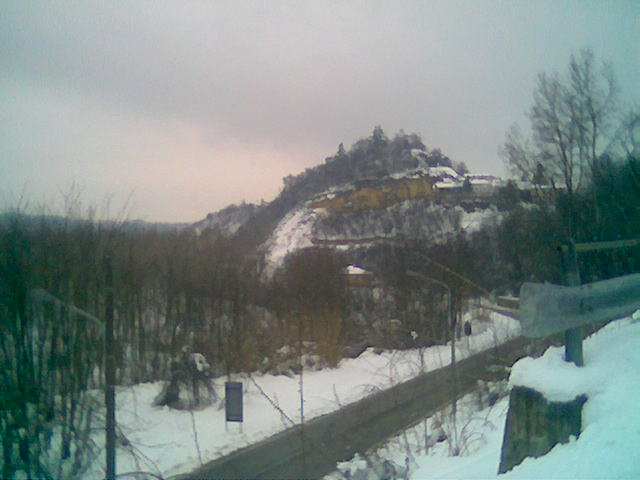 Foto di Incisa Scapaccino con la neve